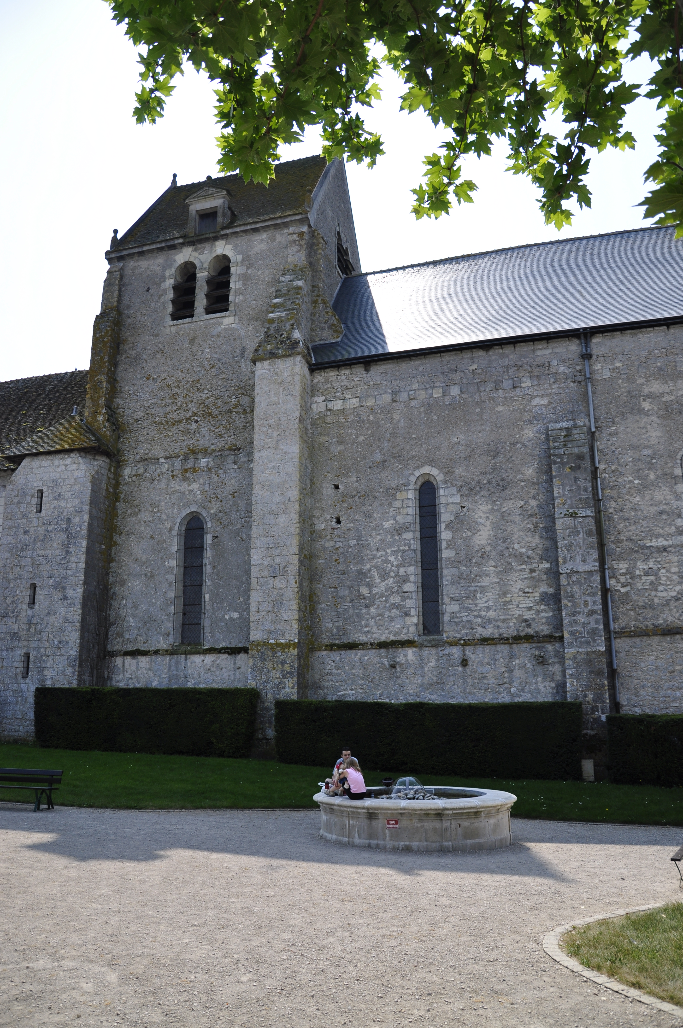 Église Notre-Dame de Fontaines-en-Sologne, France (41)